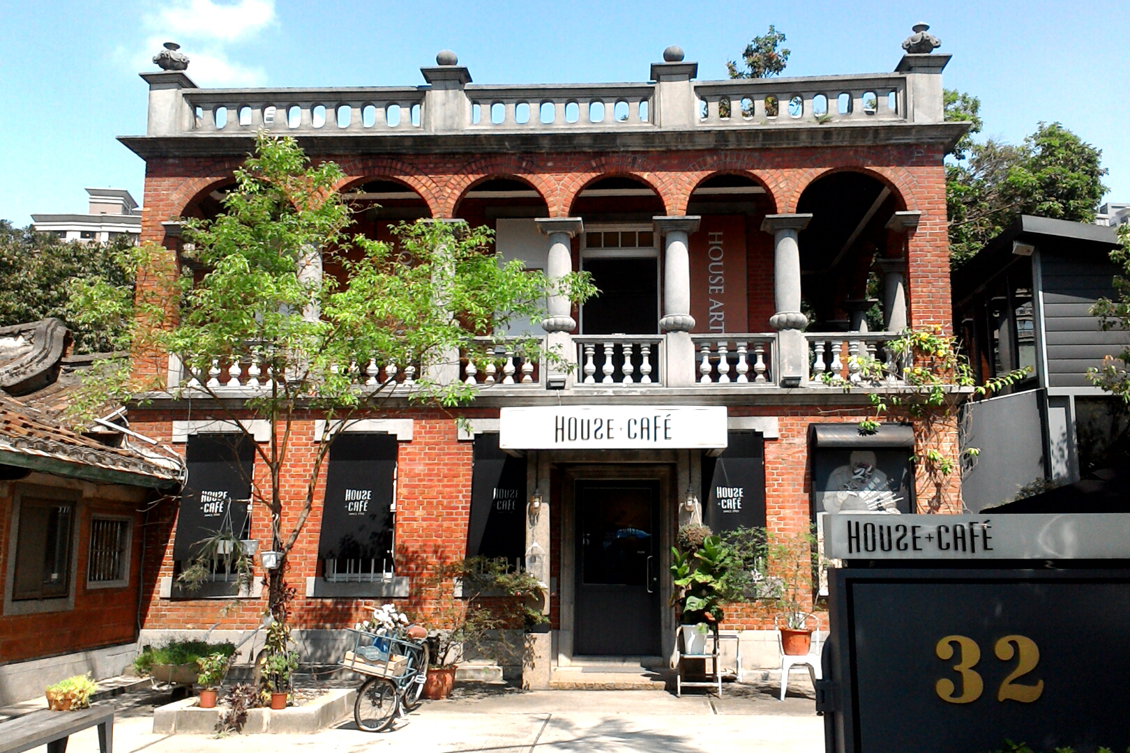 燃藜第紅樓,桃園市中壢區五權里